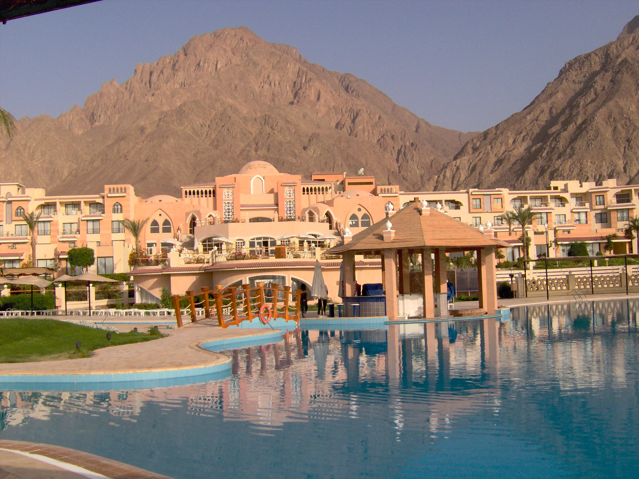 Hotel Morgana Azur Taba